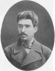 Aleksandr Ivanovic Barannikov (1858-1883)